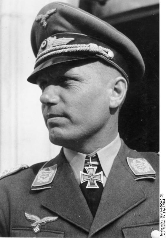 Prop.-Kp. XI. Flg. Kps. Film-Nr.: 2020/7 Bildberichter: Stocker Text: Dahm Ort: Cassino Datum: April 1944 549. Eichenlaub für einen der ältesten und verdientesten Fallschirmjäger-Kommandeure: Oberst Karl Lothar Schulz wurde vom Führer mit dem Eichenlaub zum Ritterkreuz des Eisernen Kreuzes ausgezeichnet.